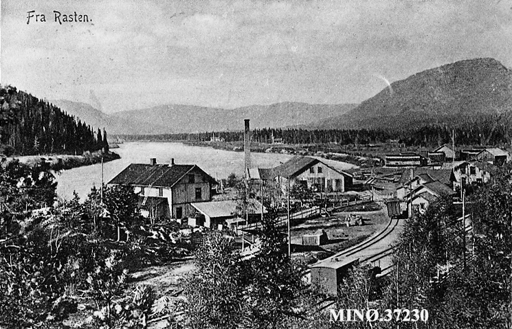 Rasta stasjonsområde 1907